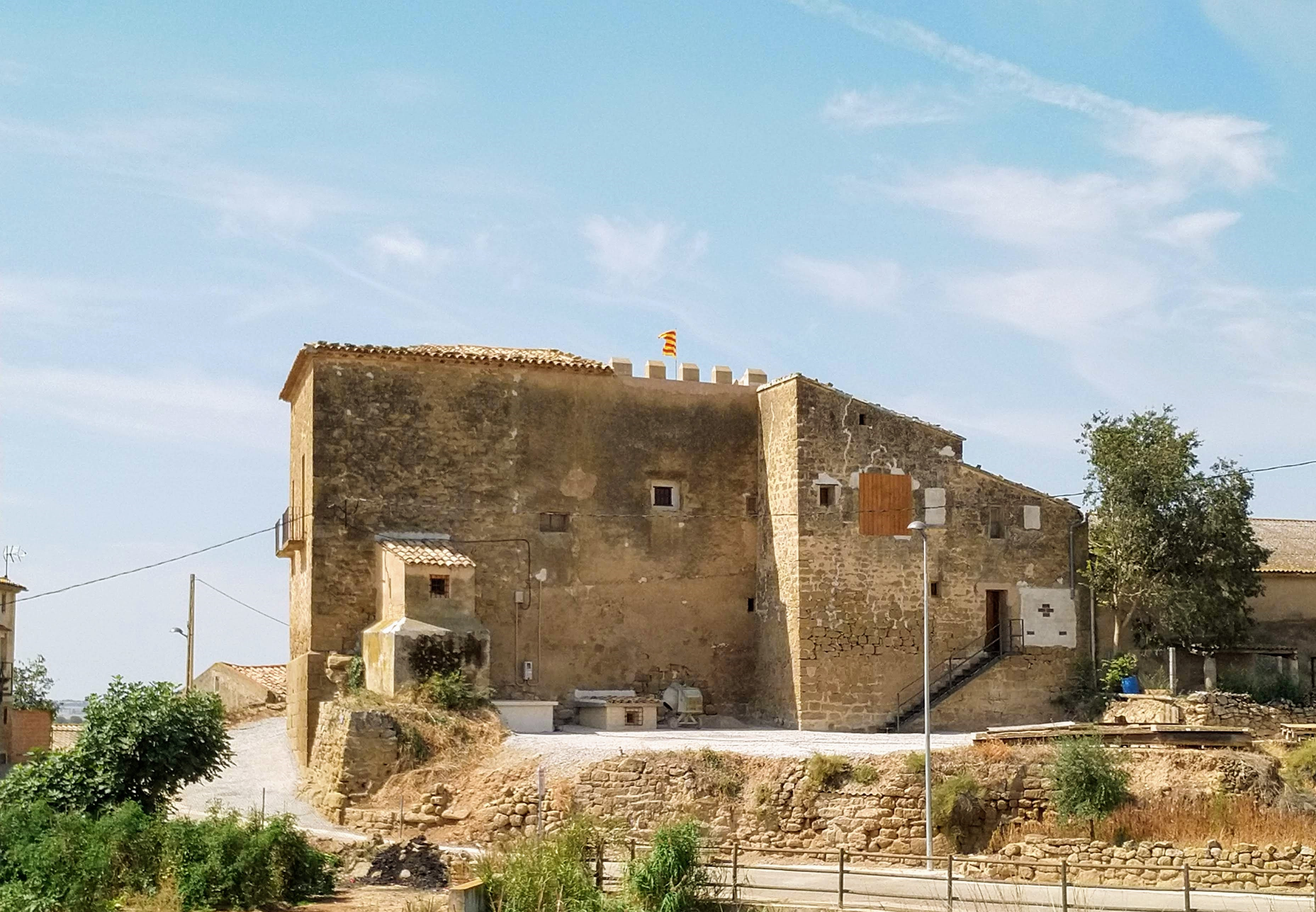 Vista posterior del Castell de les Puelles